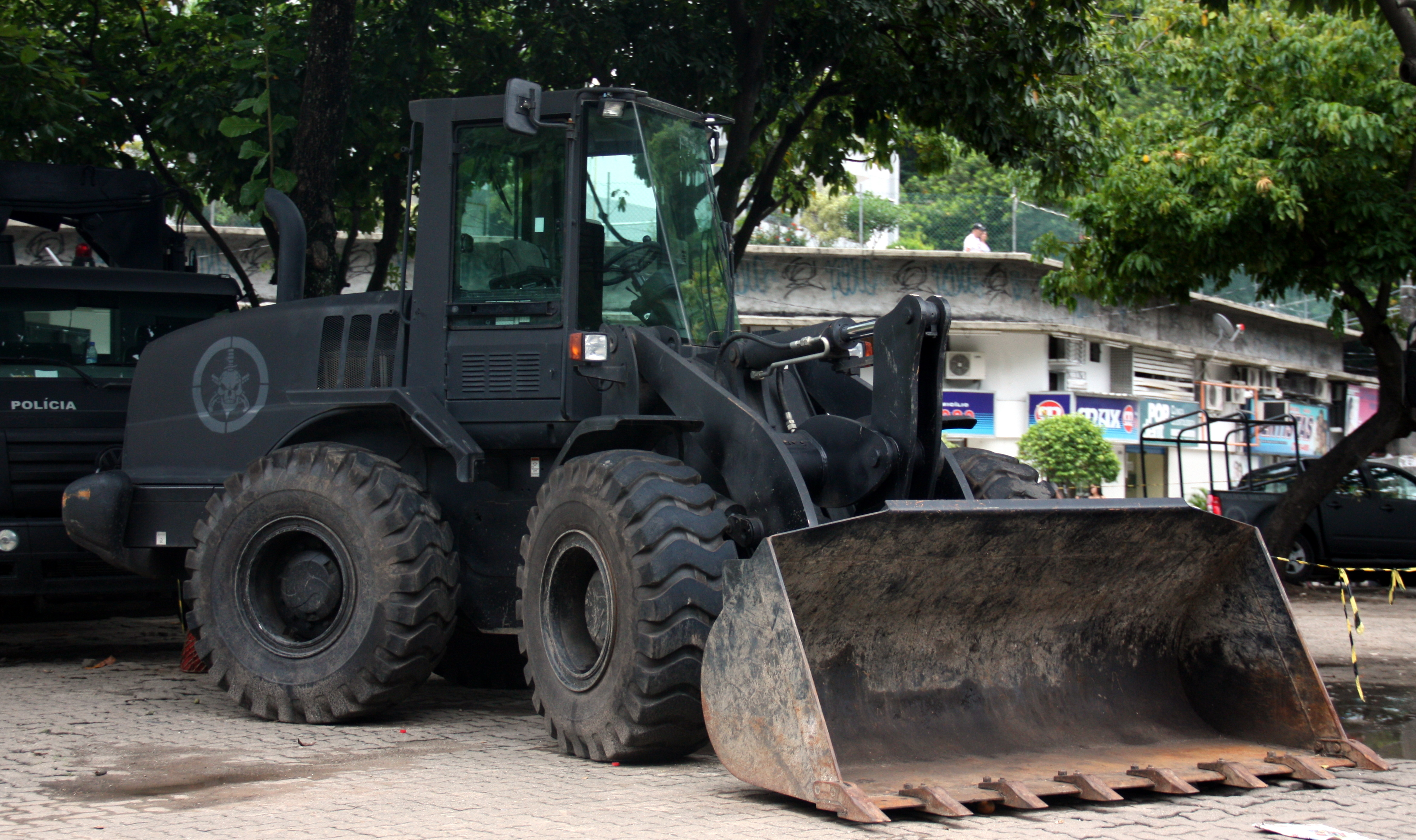 Batalhão de Operações Especiais Polícia Militar do Estado do Rio de Janeiro